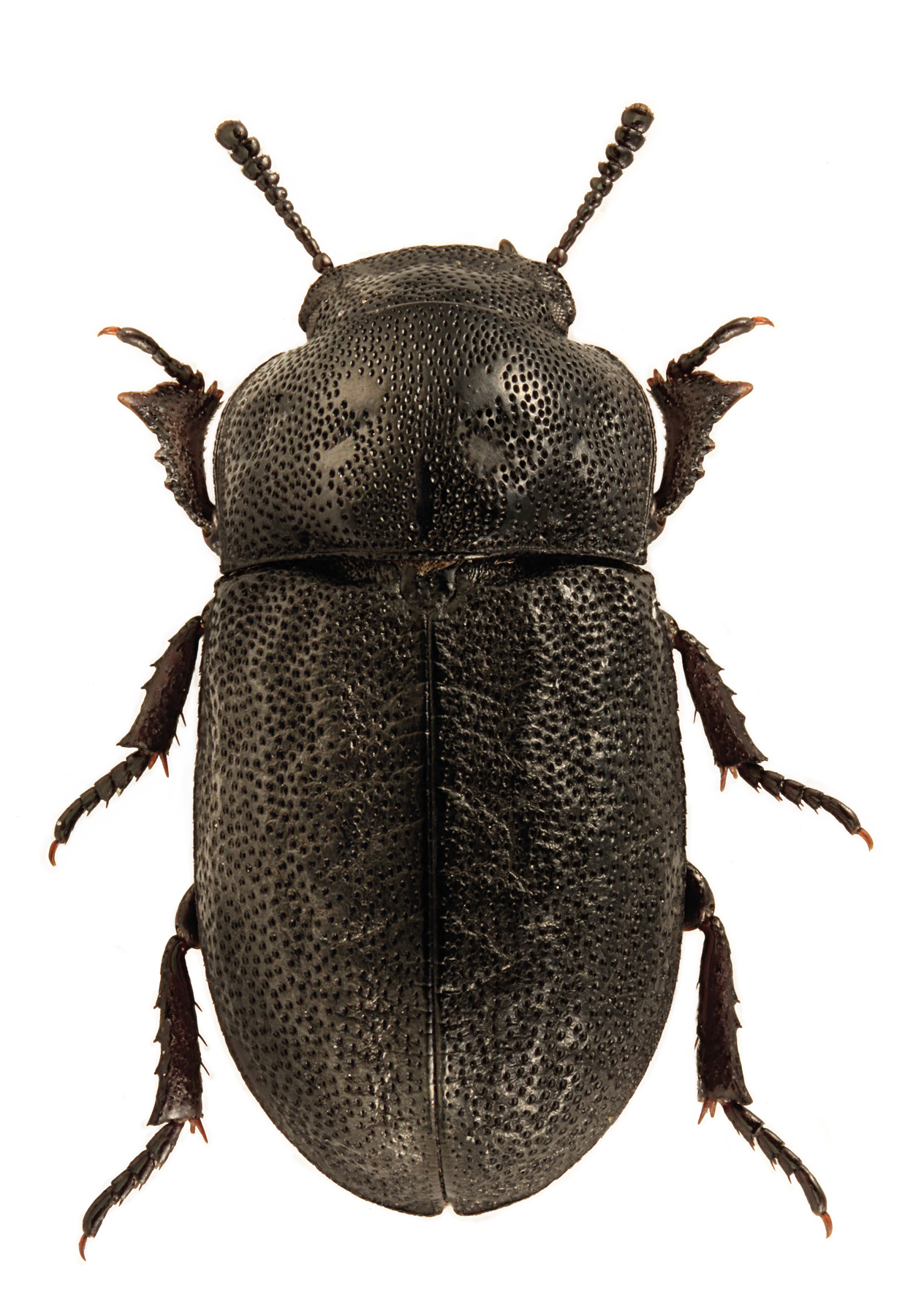 Melanimon tibialis